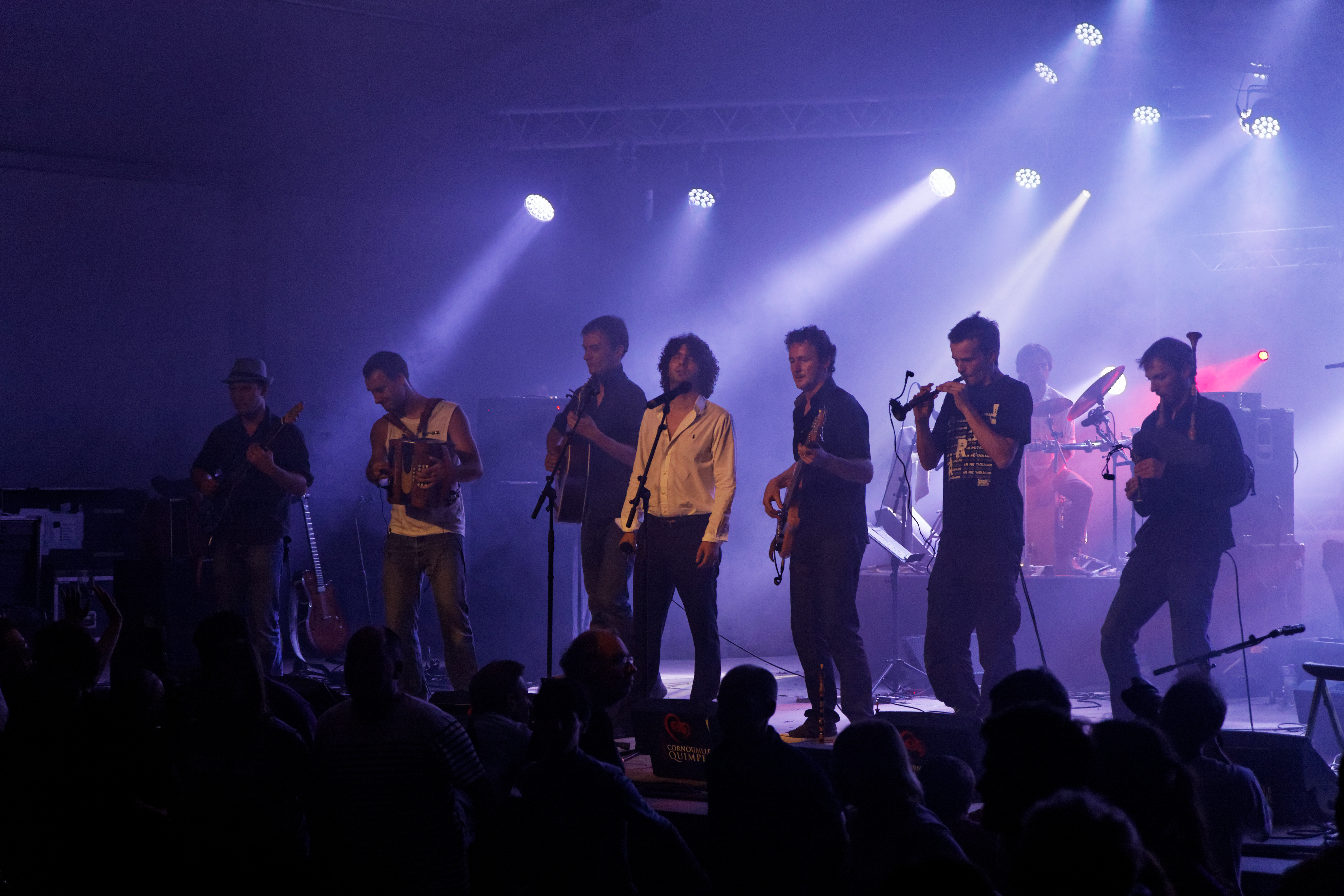 Startijenn en concert à l'espace évêché lors du festival de Cornouaille 2013.